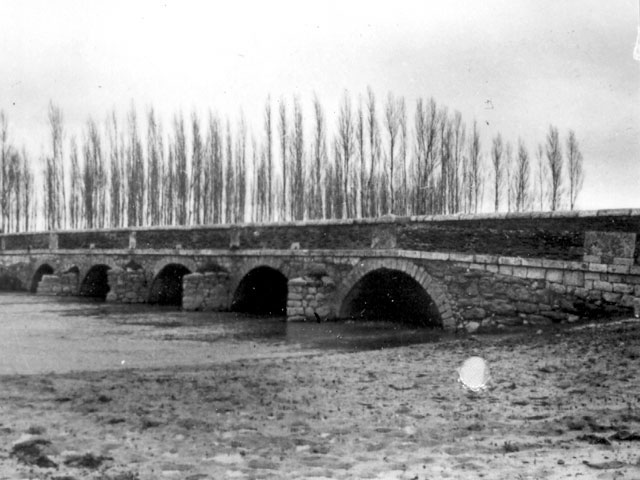 Puente sobre el río Sequillo - San Pedro de Latarce (Valladolid) - Cuaderno. Álbum de Valladolid - Fotografía 60 x 42 B/N